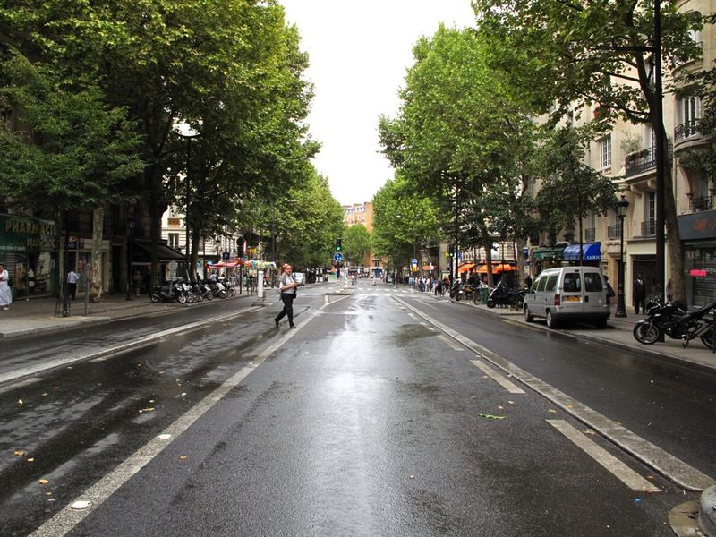 Photo du boulevard barbès